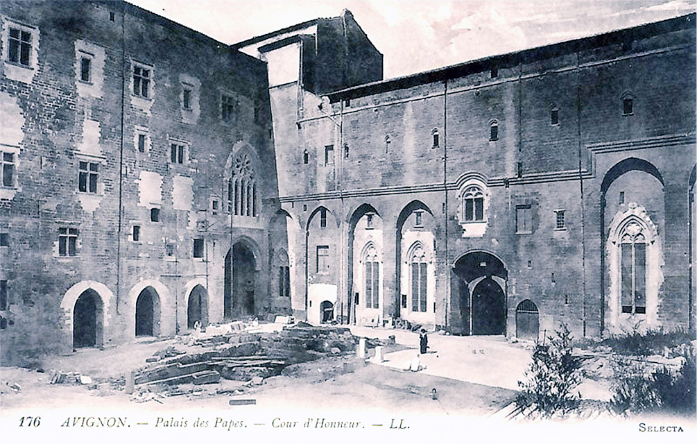 Cour d'honneur du palais des papes d'Avignon en 1919